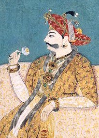 Pratap Singh of Thanjavur